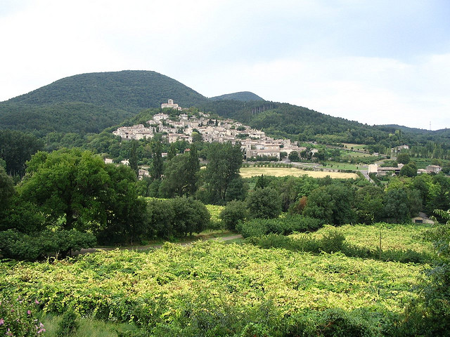 Mirmande